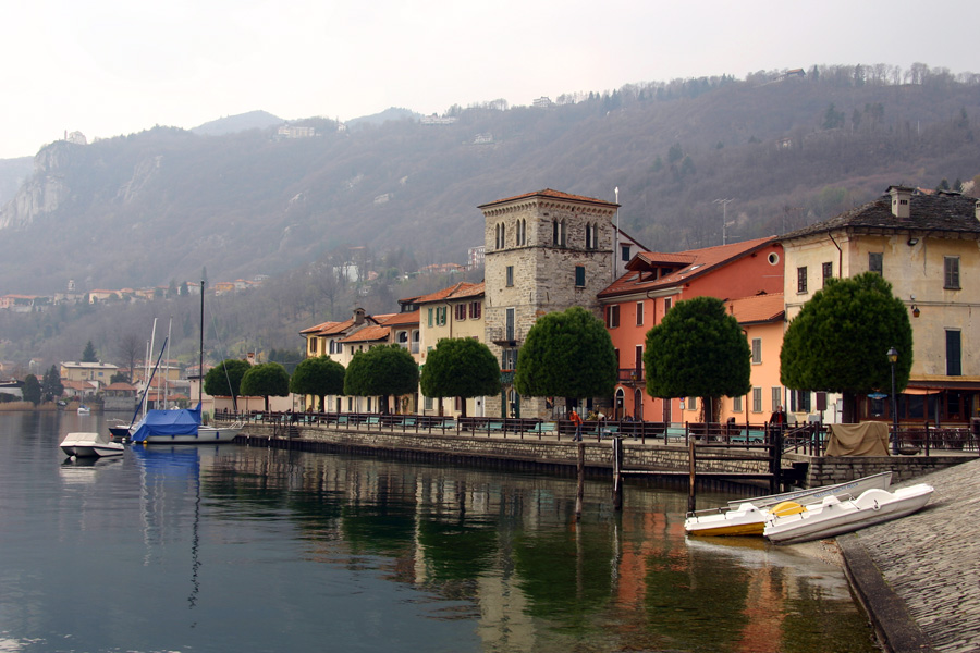 Pella (NO) vista dal suo porticciolo sul lago d'Orta. Al centro la torre medioevale.